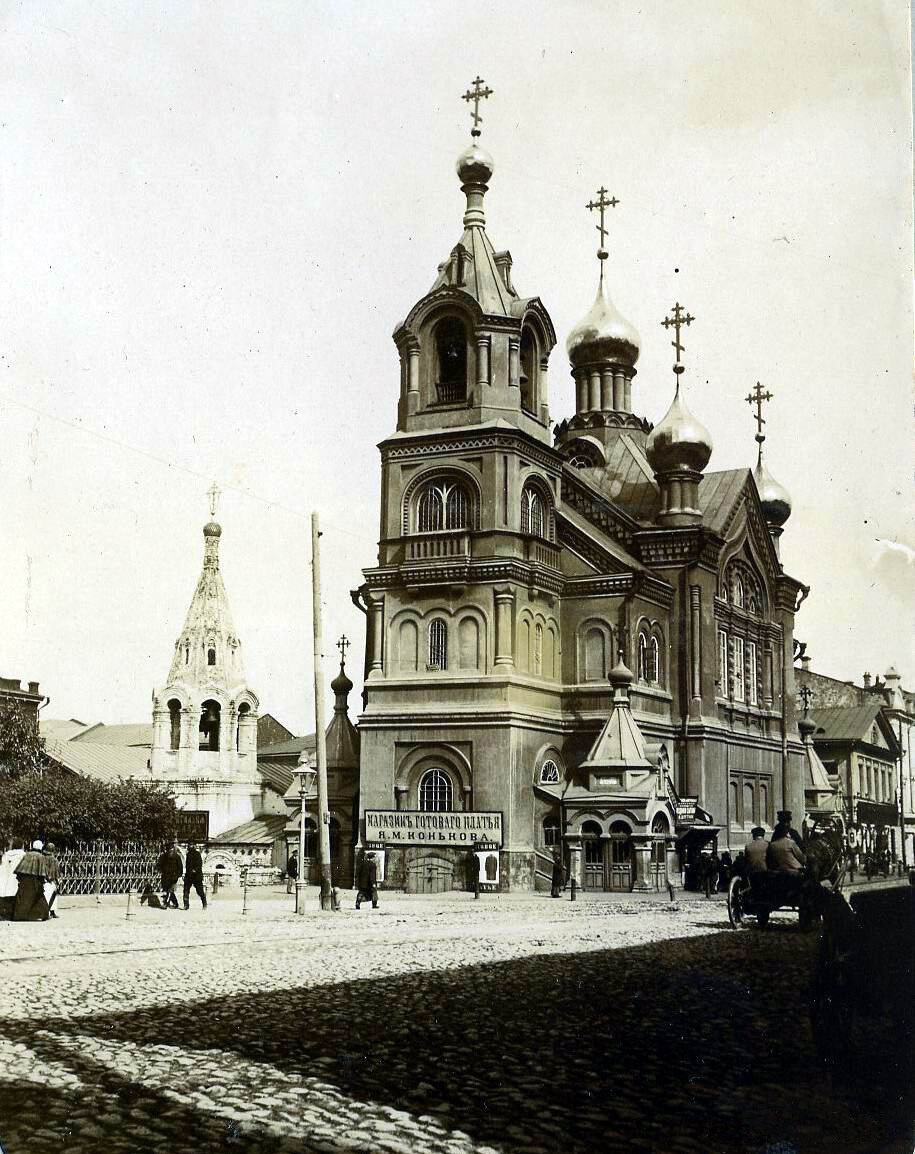 Козьмодемьянская церковь на Софроновской площади Нижнего Новгорода